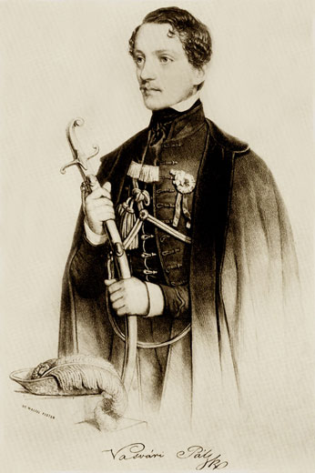 Vasvári Pál (litográfia).